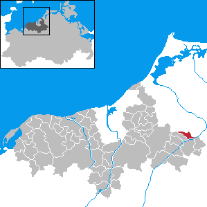 Stubbendorf in Mecklenburg-Western Pomerania - District Bad Doberan